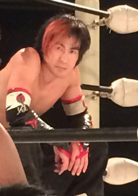 2013年・蕨